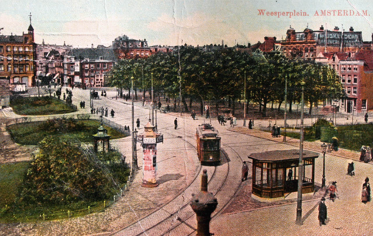 Weesperplein met tram ~1905 (ansichtkaart, kleur).